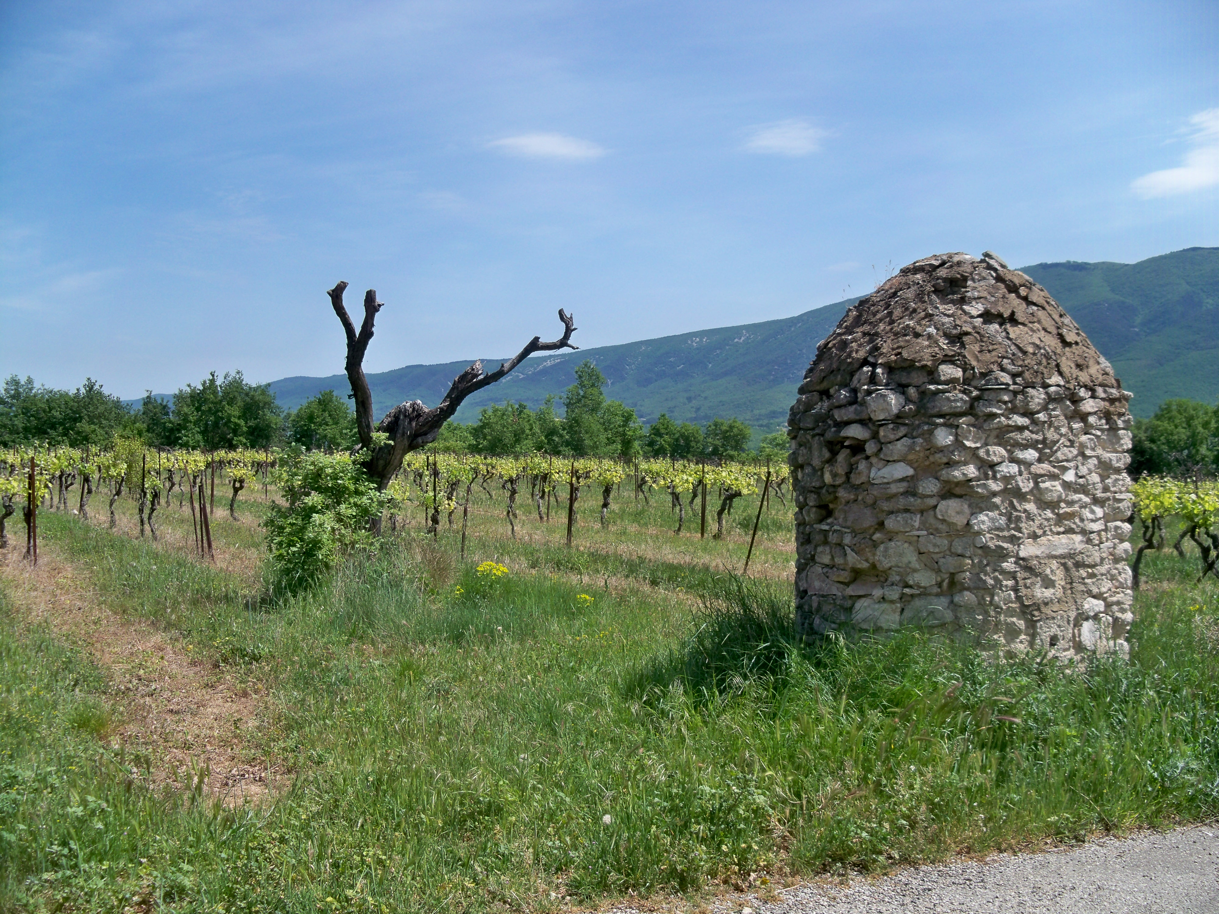 vignes et puits couvert près de Saint Martin de Castillon, Vaucluse, France